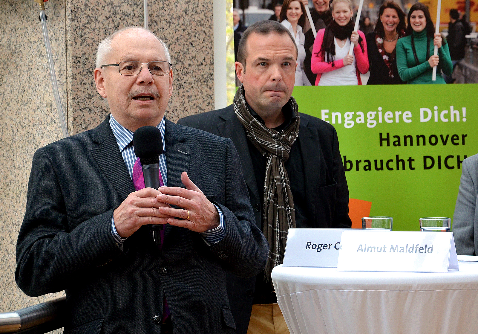 Reinhard Scheibe (links vor Roger Cericius vom Freundeskreis Hannover), Vorstand des Freiwilligenzentrums Hannover, eröffnete die Veranstaltung Gemeinsam – gut leben in Stadt und Region! Ein Stadtgespräch zur Lebensqualität in Hannover ...